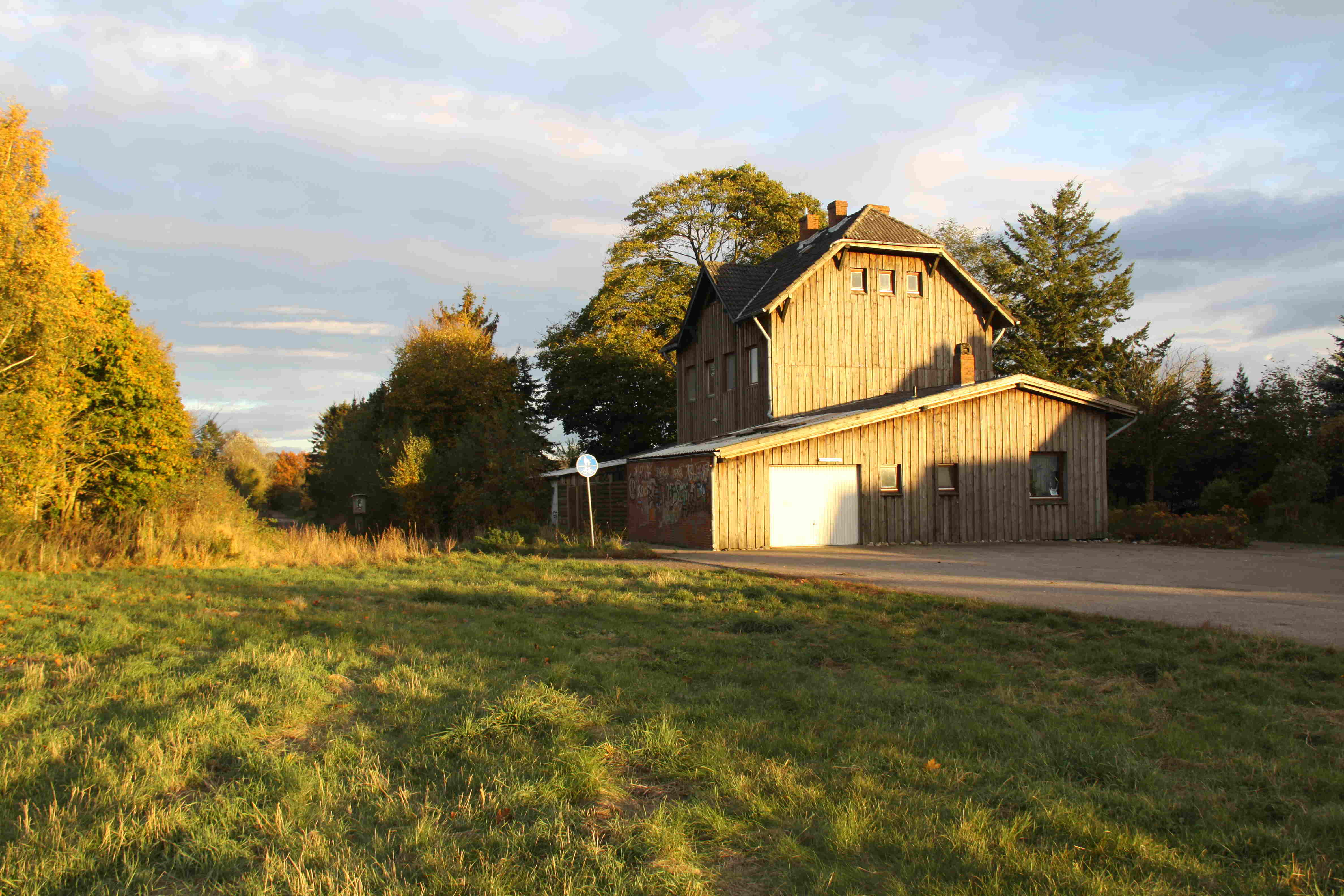 Bahnhof Fockbek